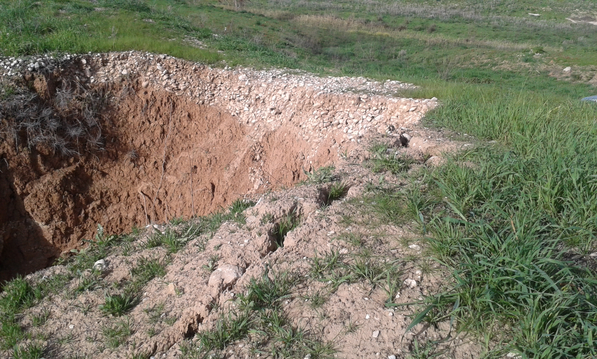 מבנה סוללת הרכבת מנחל שורק לקוסיימה